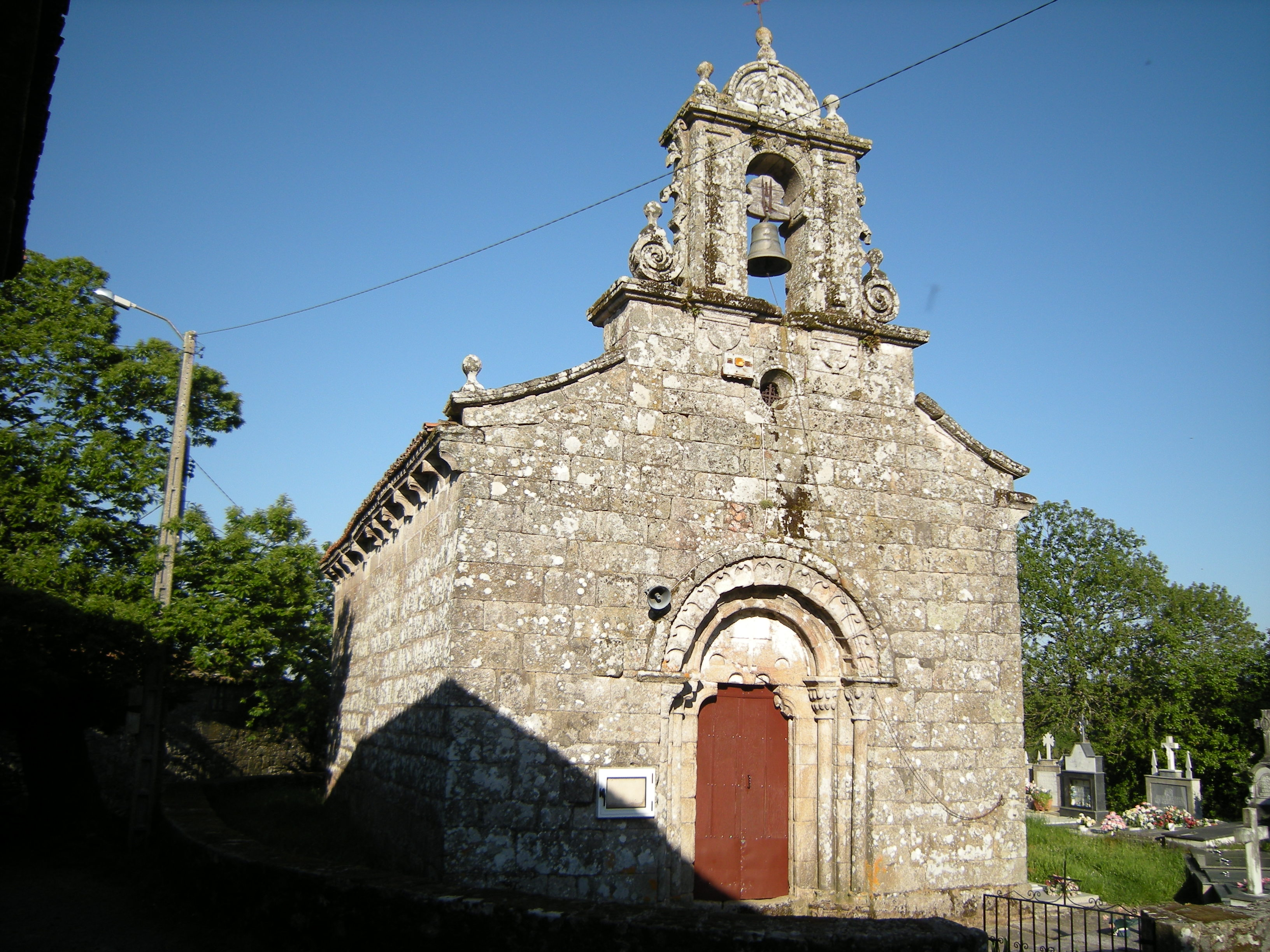 Igrexa de Santa María de Arcos, Antas de Ulla Construida en el último tercio del siglo XII, sufre pequeñas reformas posteriores.